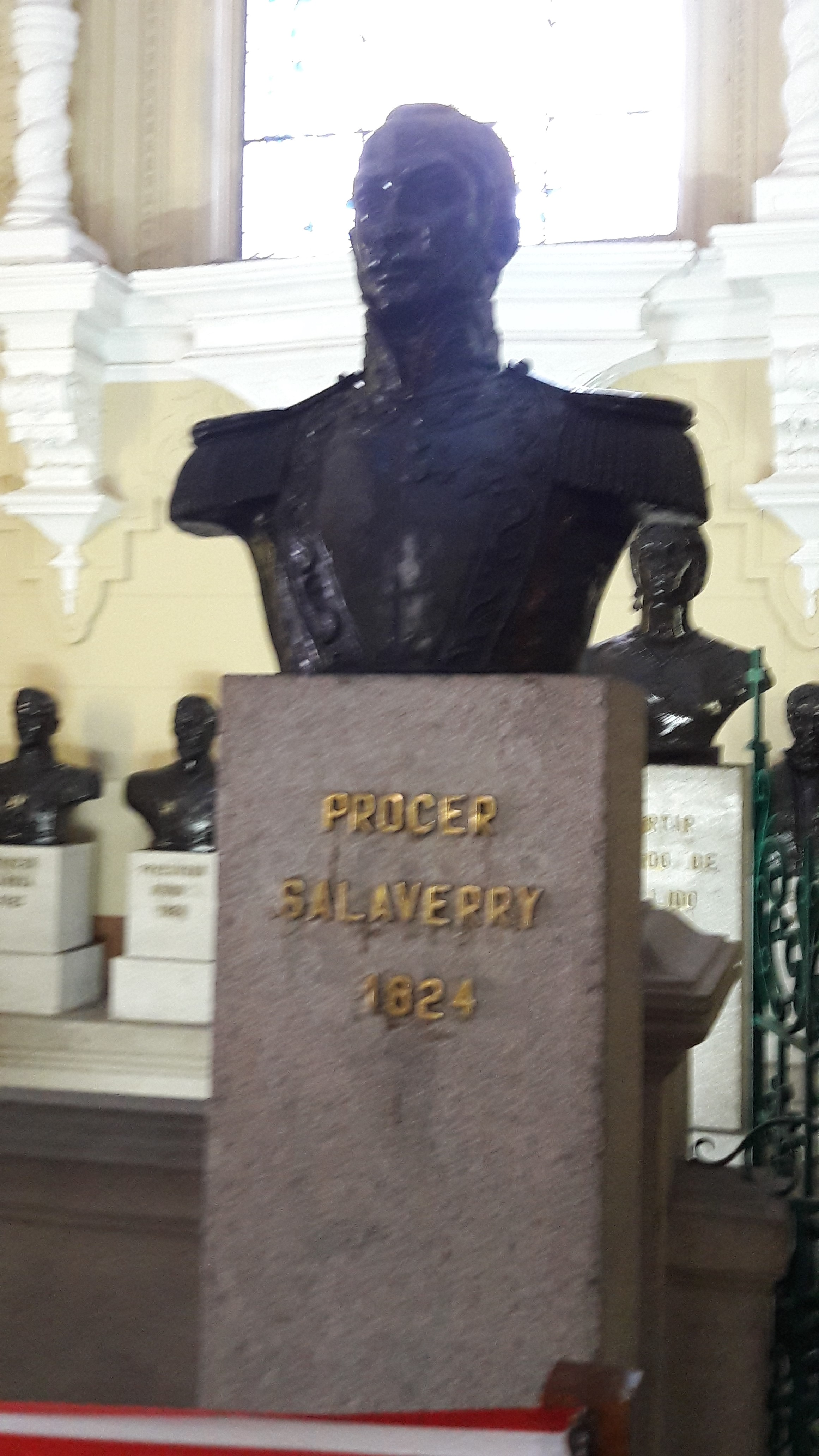 Prócer Salaverry 1824